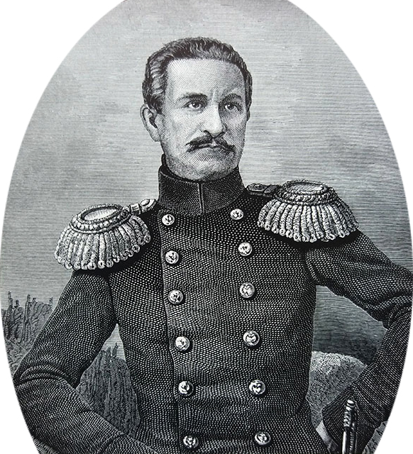 Данненберг, Пётр Андреевич